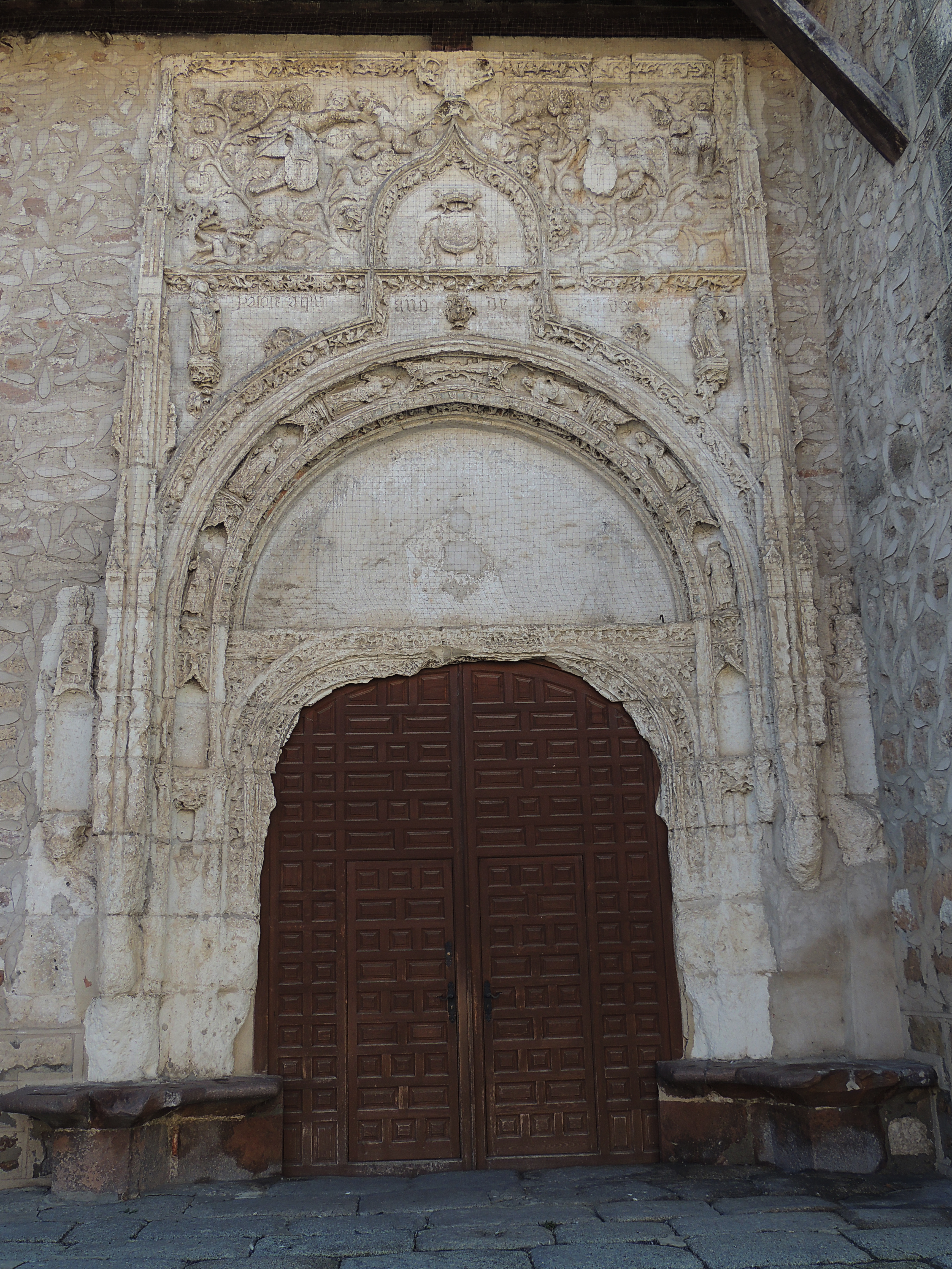 Fuentepelayo - Iglesia de Santa Maria